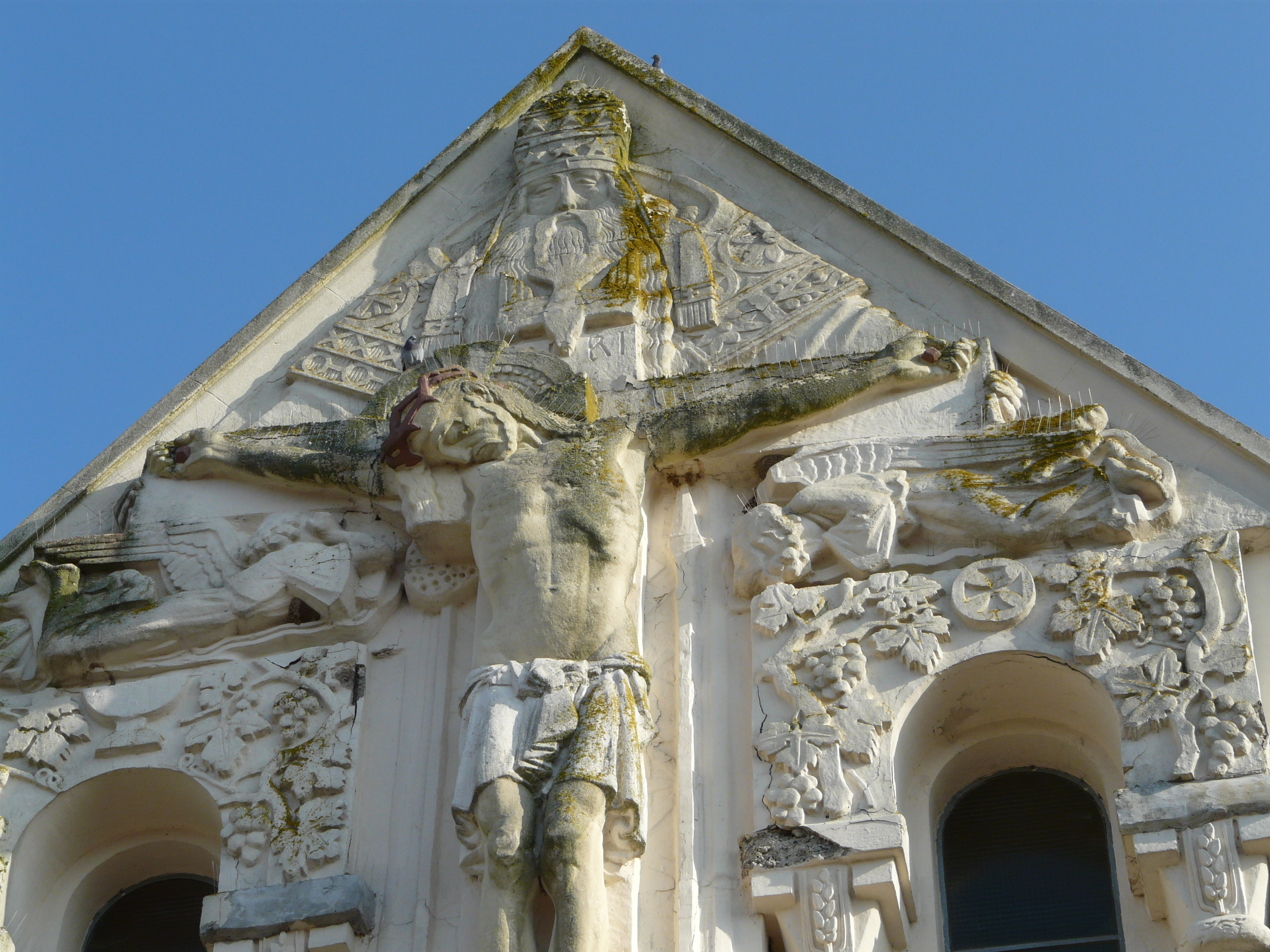 L'église de Villers-Plouich (Nord), construite en 1930 sur les plans de Pierre Leprince-Ringuet (détail de la façade)